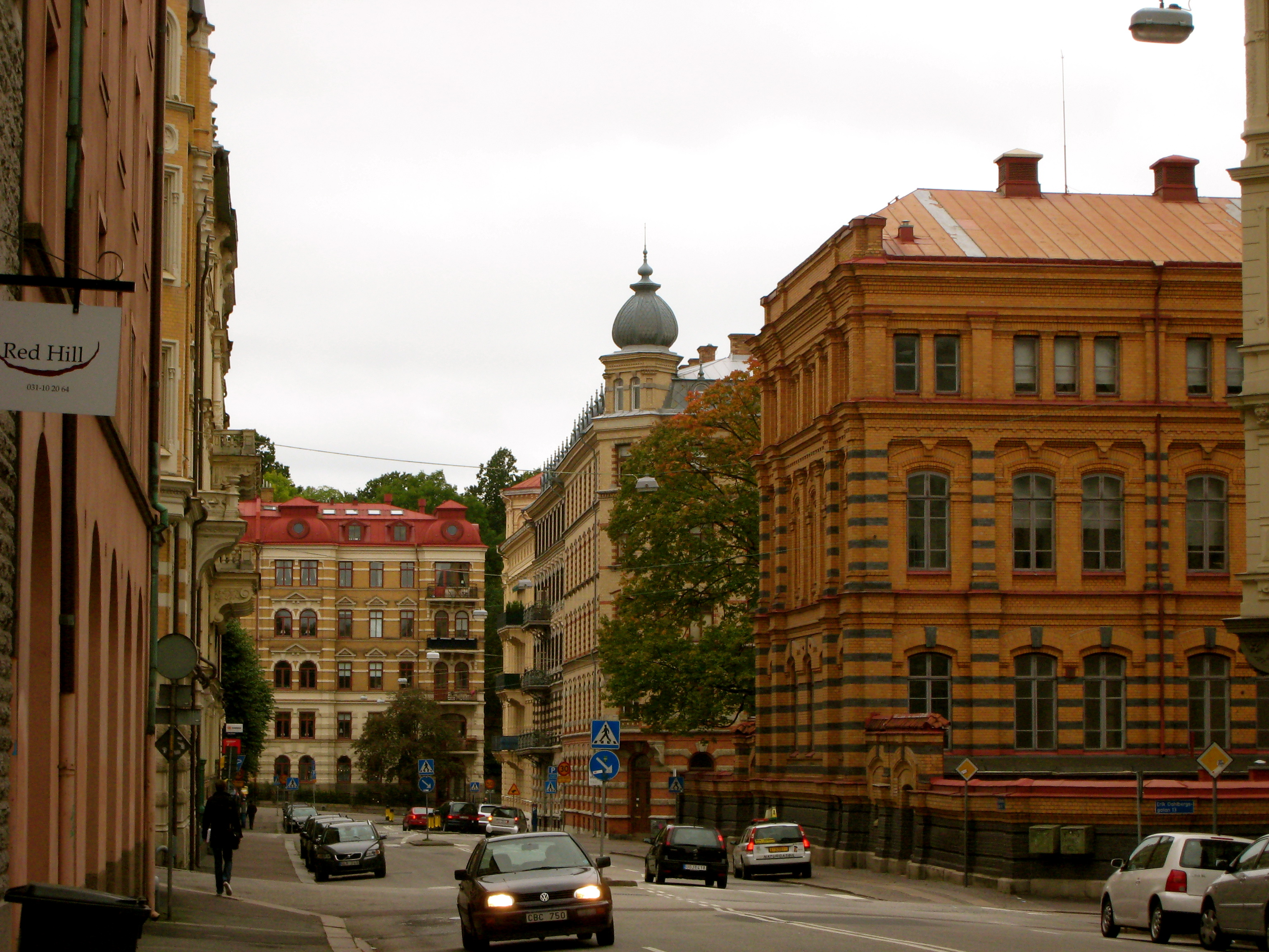 Engelbrektsgatan, sedd från korsningen mot Erik Dahlbergsgatan. Till höger Schillerska gymnasiet.